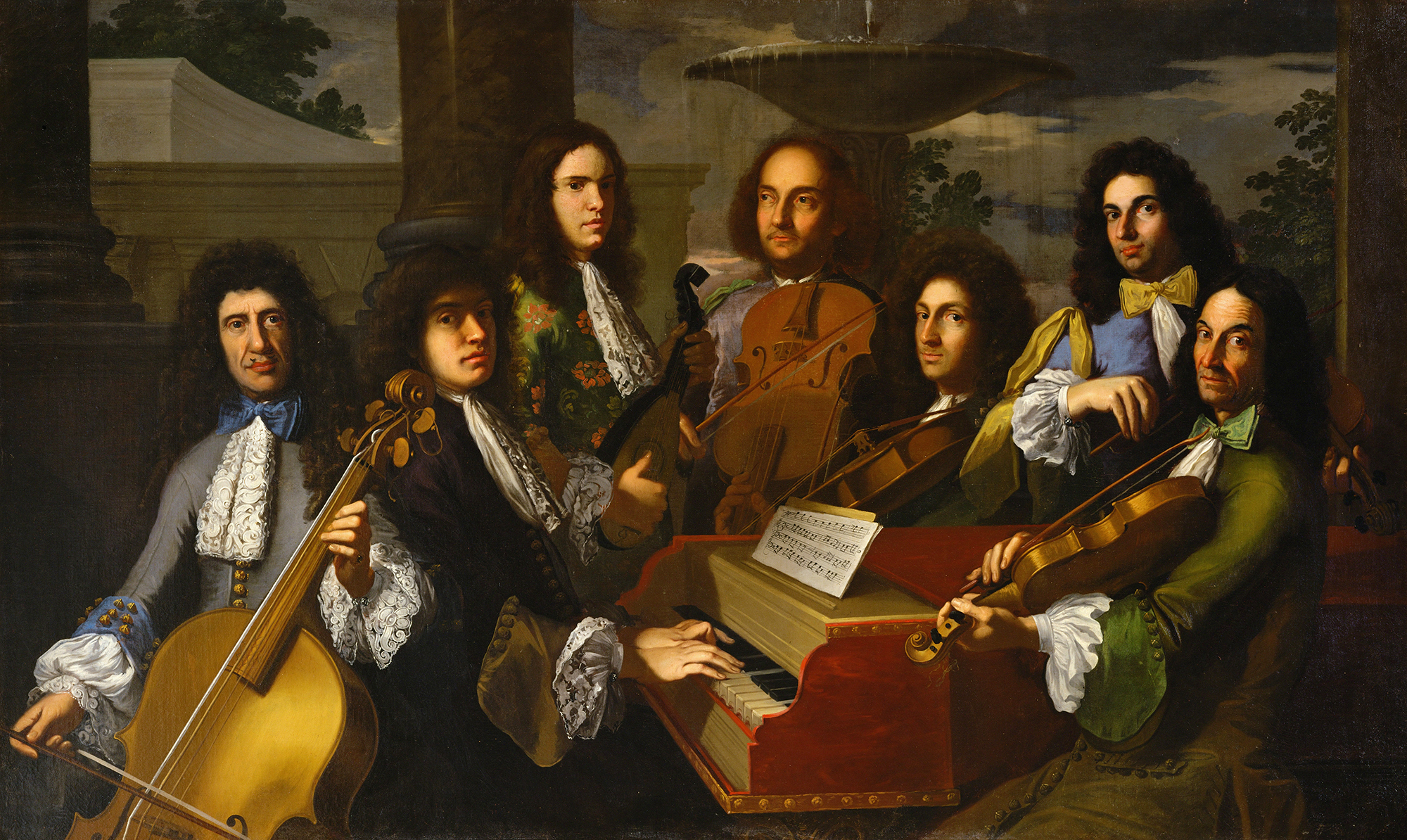 I musicisti del principe Ferdinando de' Medici